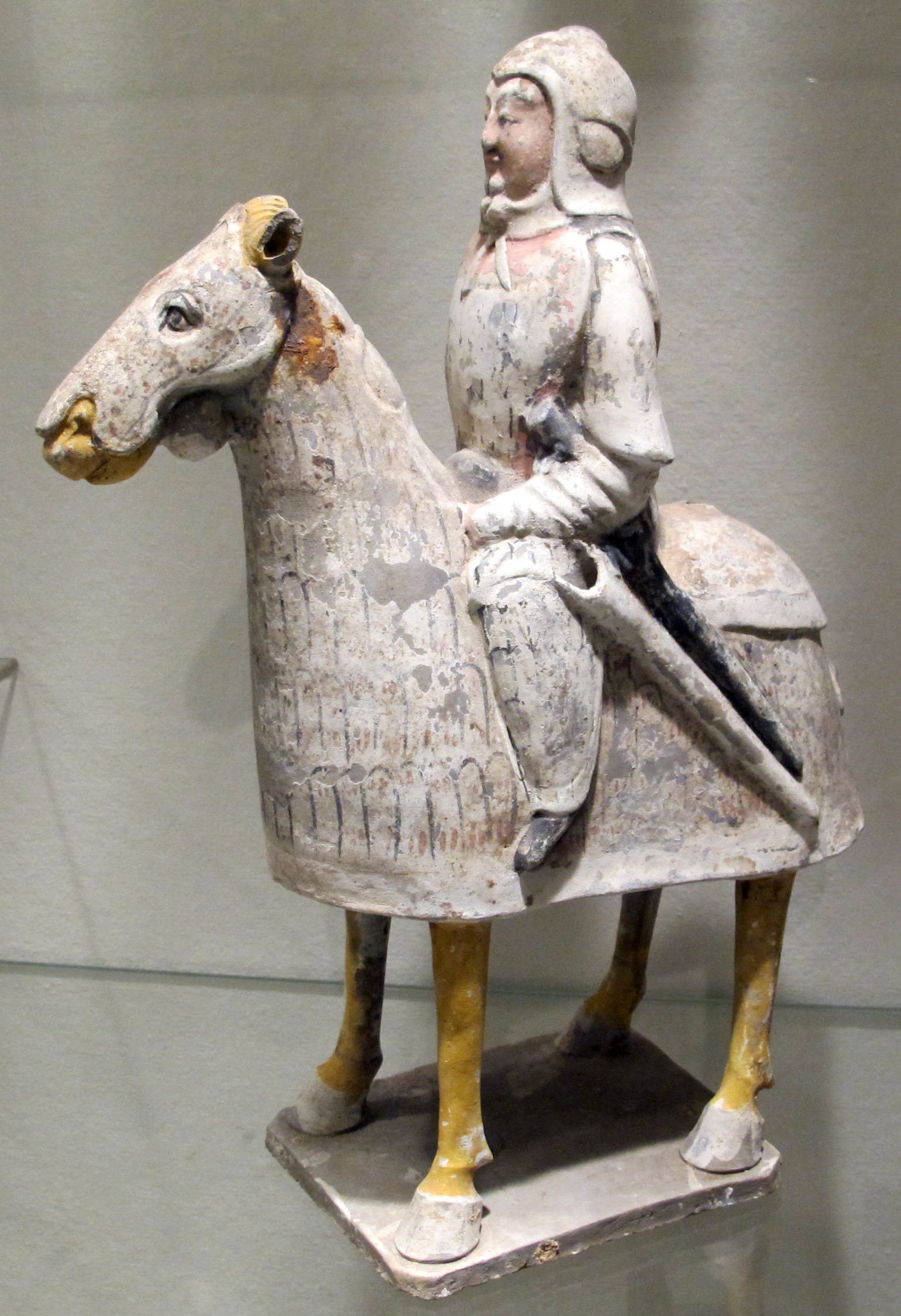 Philadelphia Museum of Art